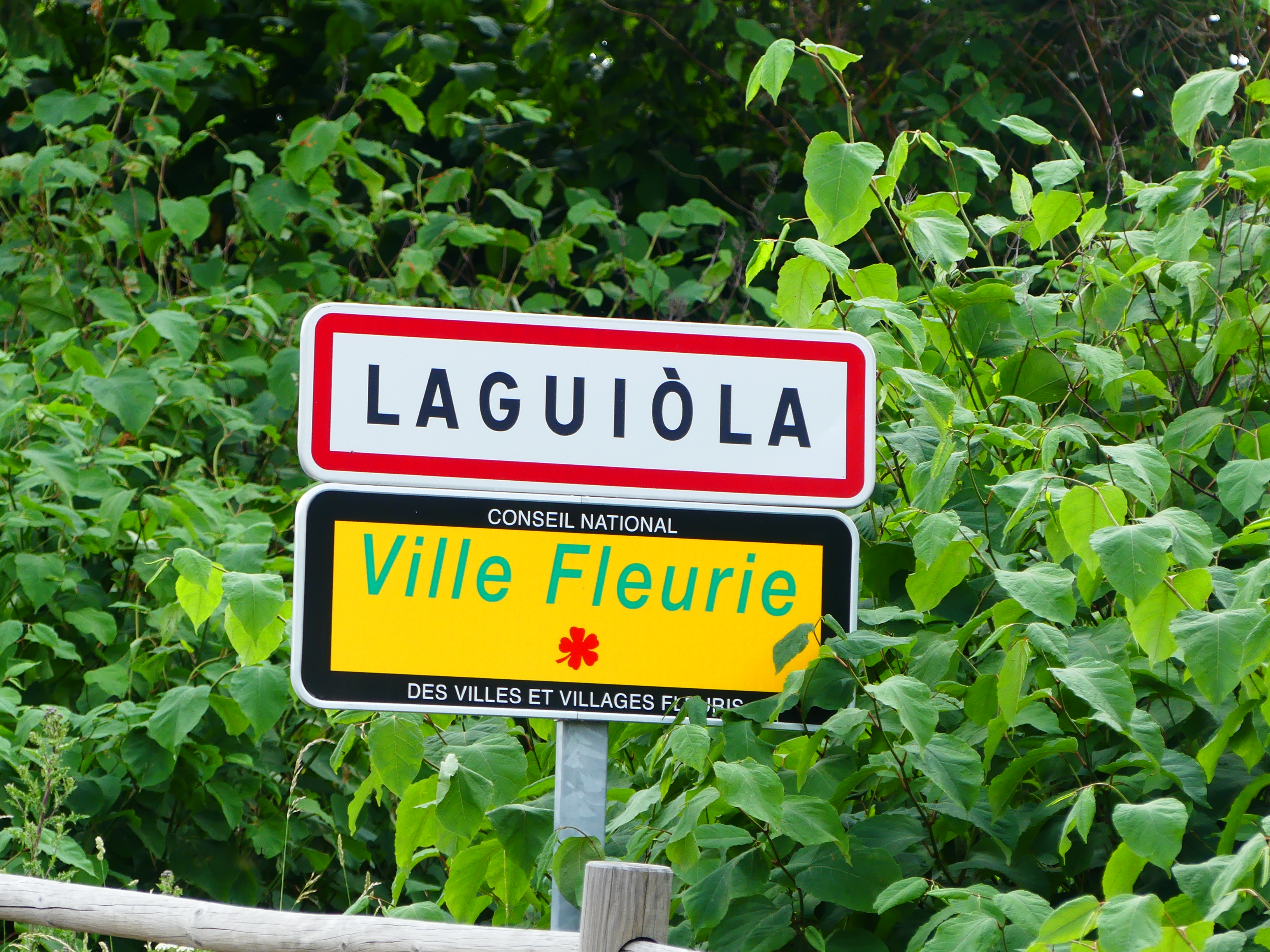 Panneau en occitan à Laguiole, Aveyron, France. Ce panneau est erroné : le nom occitan de Laguiole devrait être La Guiòla.